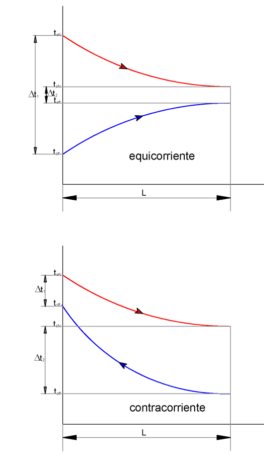 Distribución de temperatura en intercambiadores equicorriente y contracorriente